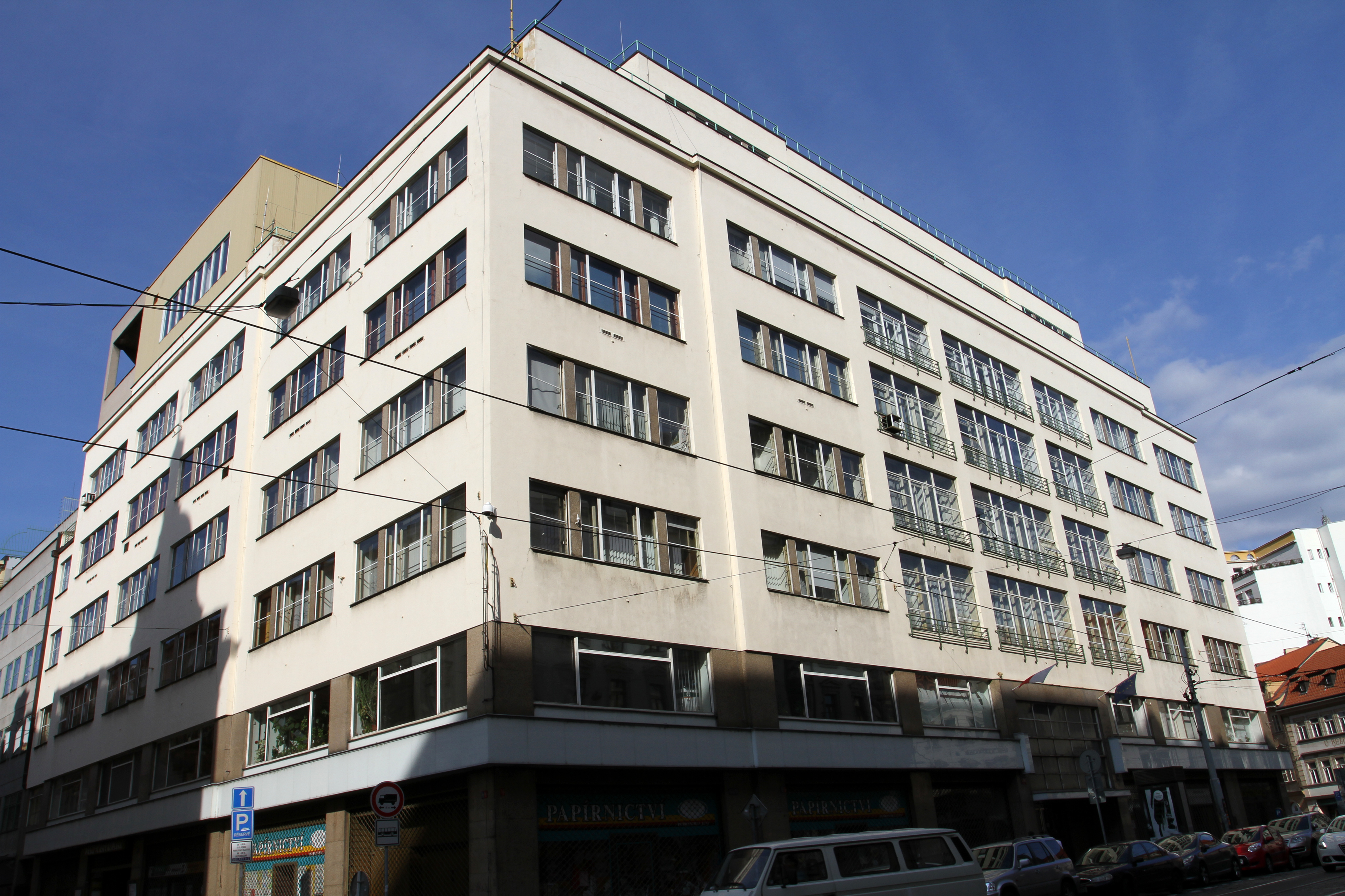 Jiná správní stavba - býv. palác Báňské a Hutní společnosti (Nové Město), Praha 1, Lazarská 15/7, Nové Město